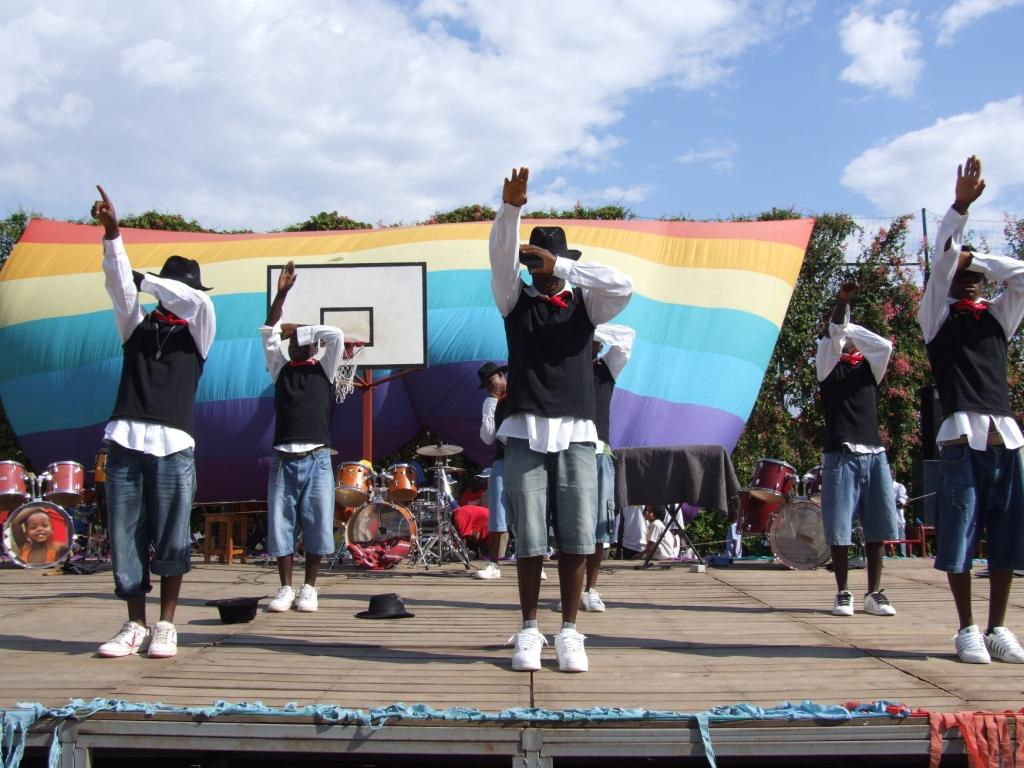 Image d'un concert au Centre Jeunes Kamenge (été 2013)